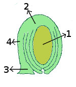 Morfología del óvulo. Óvulo anátropo. 1: saco embrionario (gametofito femenino) 2: calaza 3: funículo 4: rafe. Según UNNE, "Morfología de Plantas Vasculares", .ar Ovule structure (anatropous). 1: embryo sac (female gametophyte) 2: chalaza 3: funiculus 4: raphe